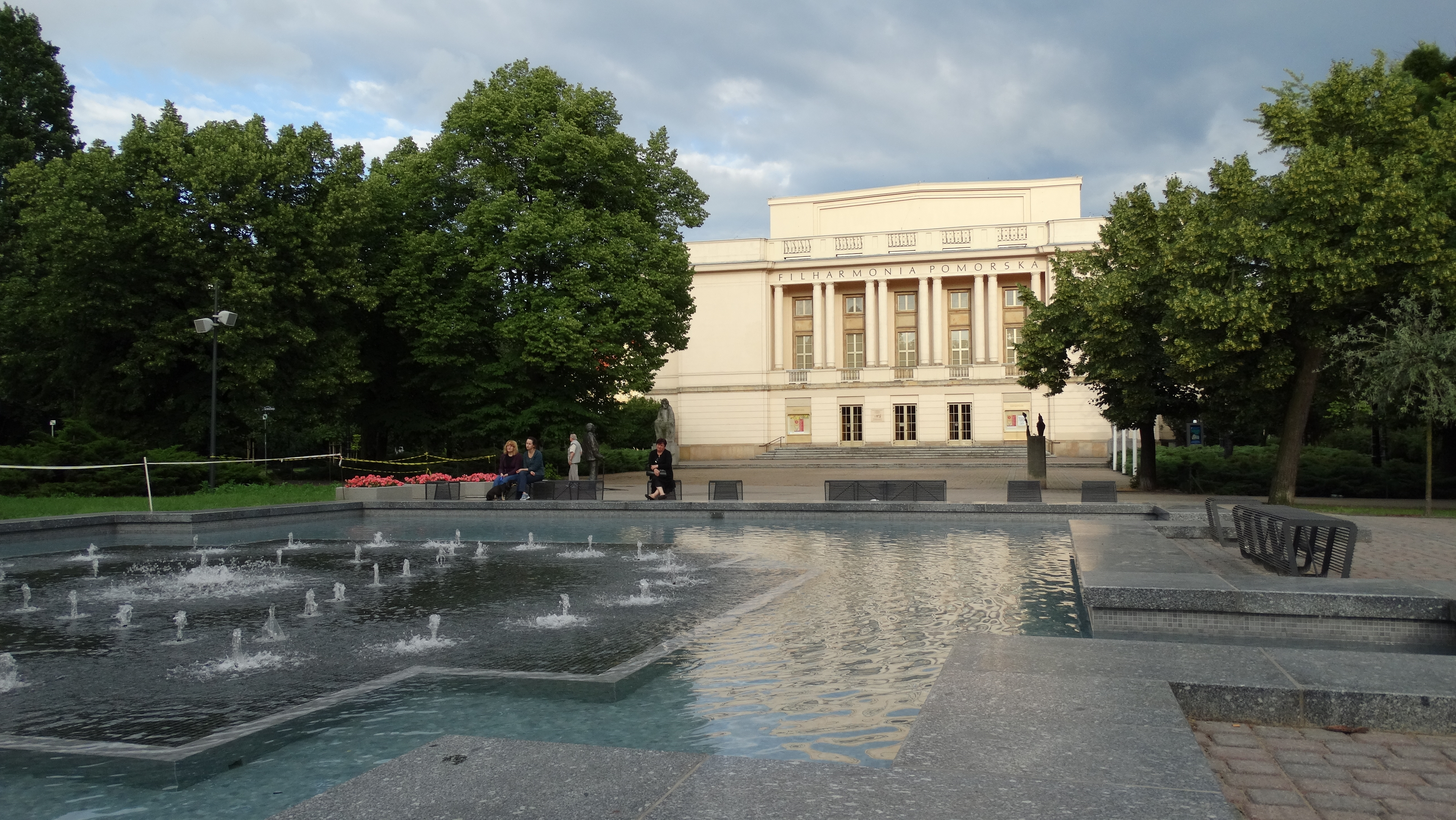 Bydgoszcz, Filharmonia Pomorska, 1954-1958